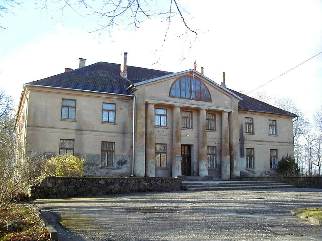 Gaviezes muižas pils 2001-11-10